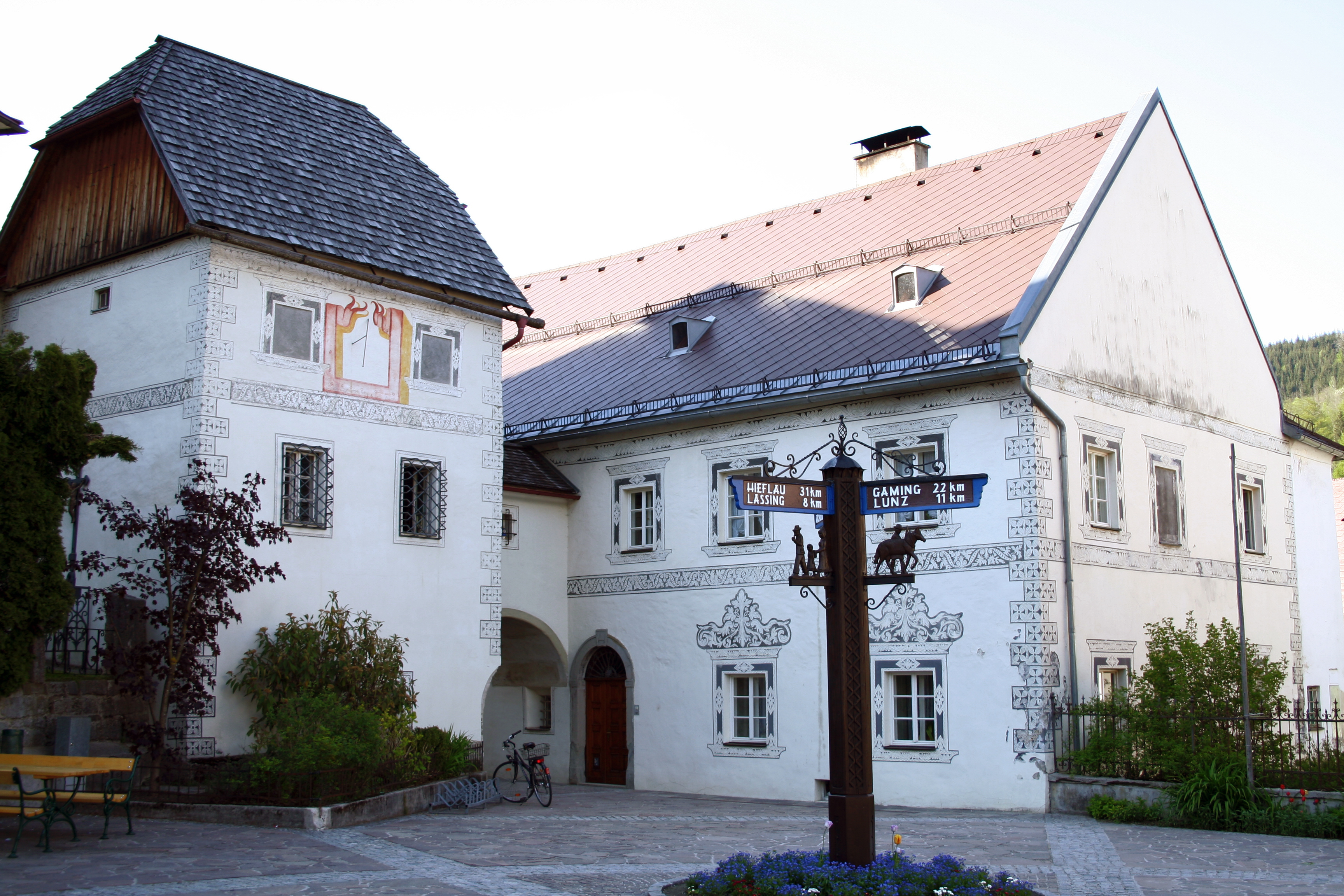 Der Pfarrhof und das Pfarrstöckl der niederösterreichischen Marktgemeinde Göstling an der Ybbs.Der Kern des Pfarrhofes ist spätmittelalterlich und wurde mehrfach umgebaut. Das dreigeschoßige Pfarrstöckl ist ebenfalls im Kern spätmittelalterlich und wurde 1588 teilweise erneuert.